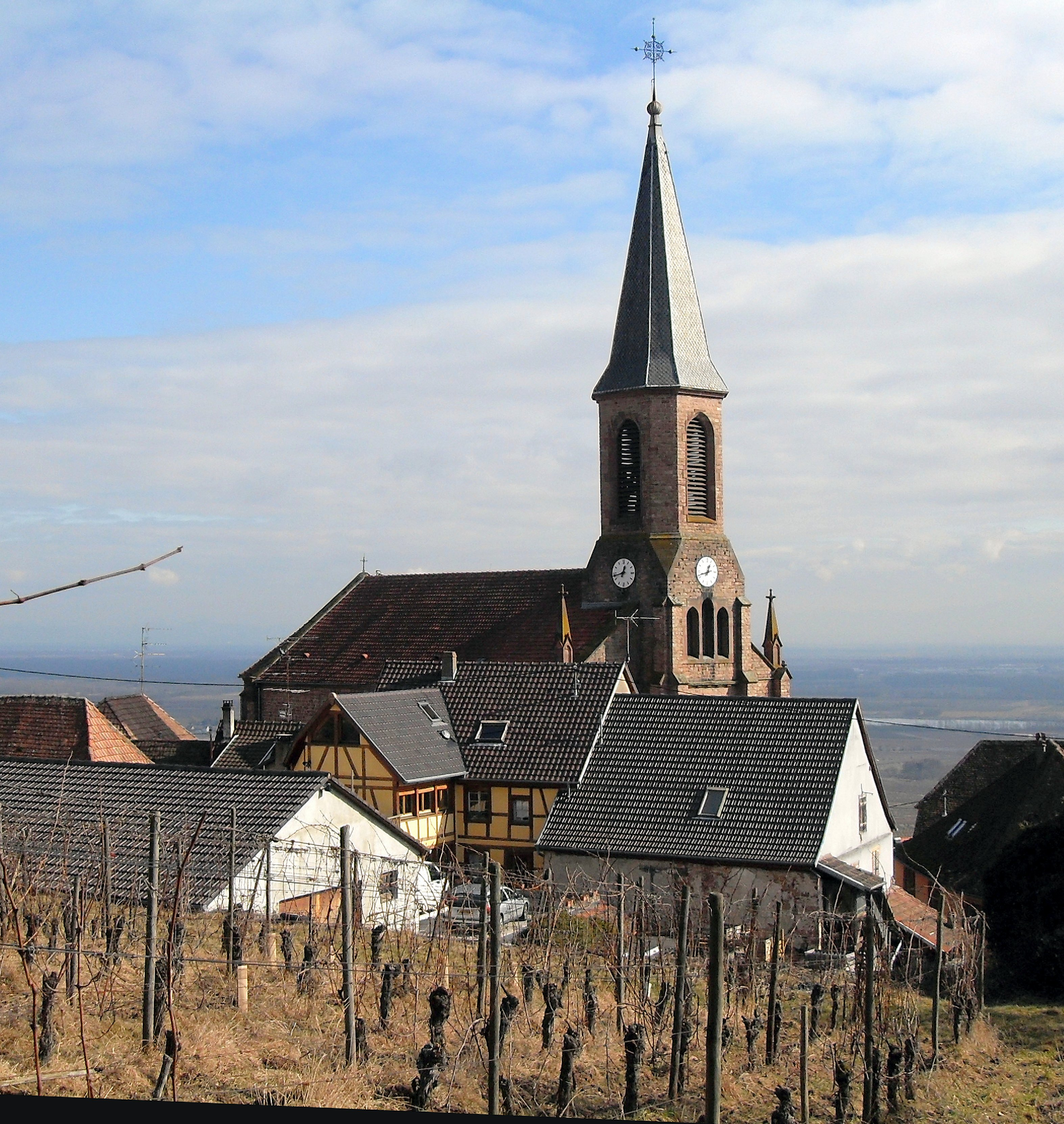 L'église Saint-Pancrace à Husseren-les-Châteaux